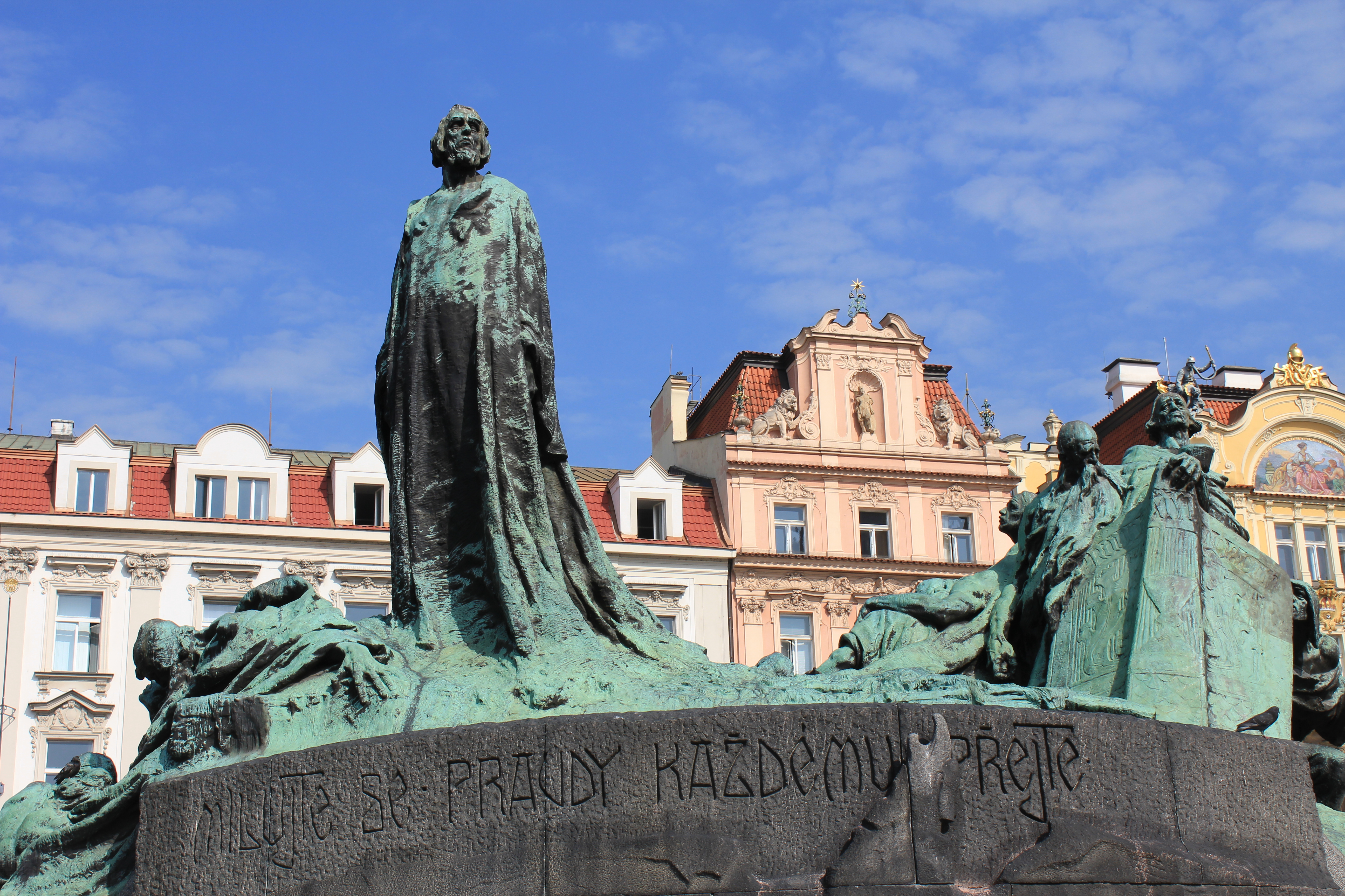 Jan Hus monumentet